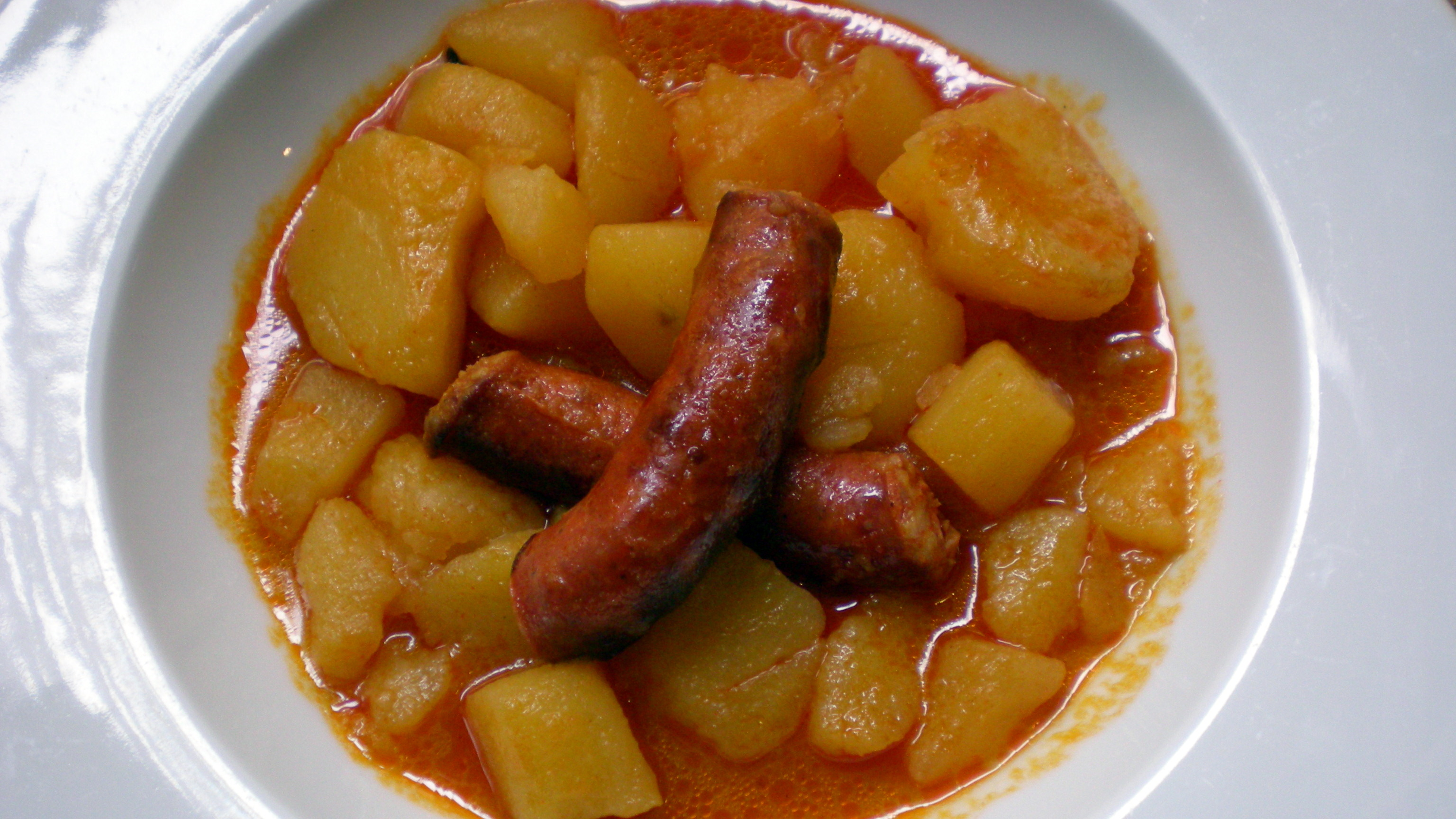 Patates guisades amb xoriço.